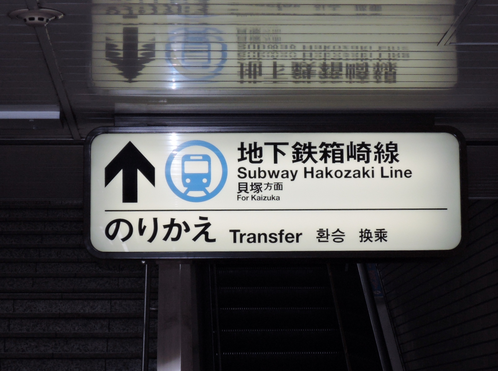 福岡市地下鉄空港線中州駅、箱崎線への乗り換え入口